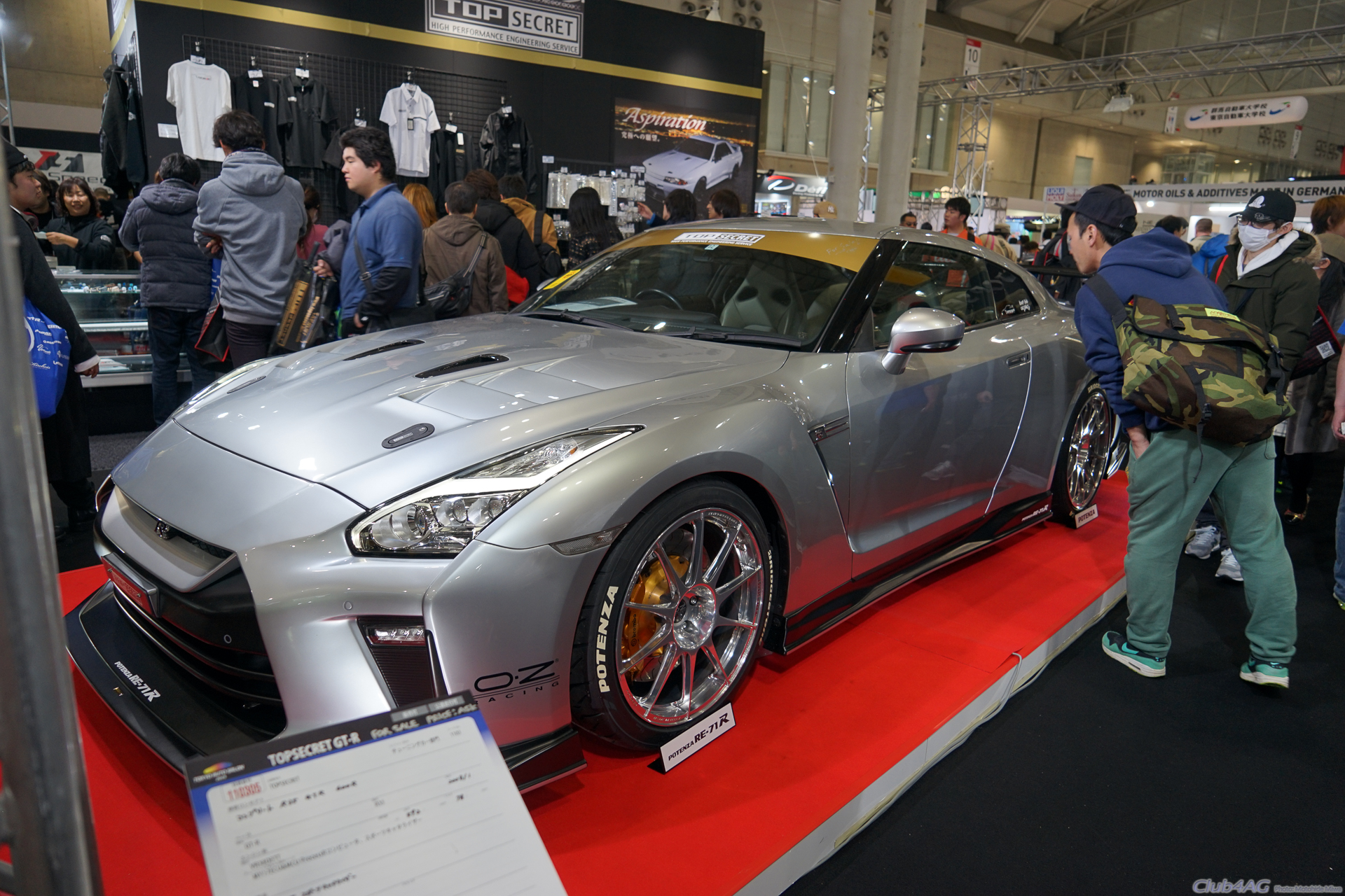 Tokyo Auto Salon 2019